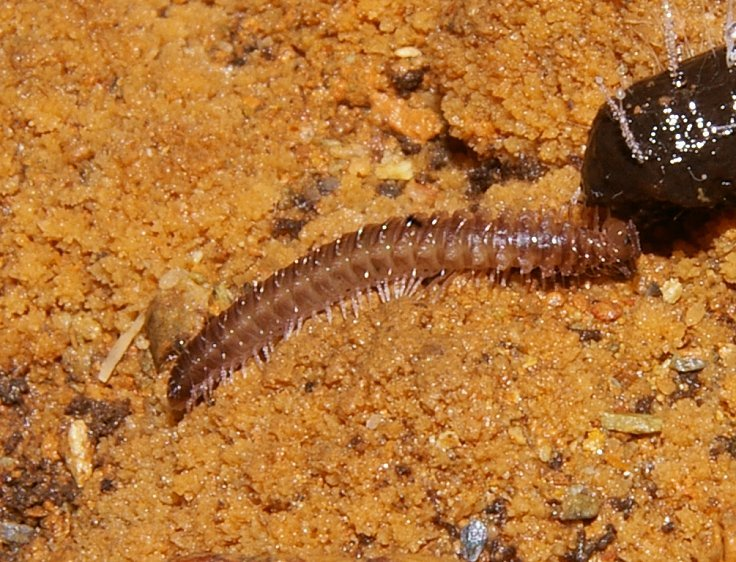 Polymicrodon près d'un excrément